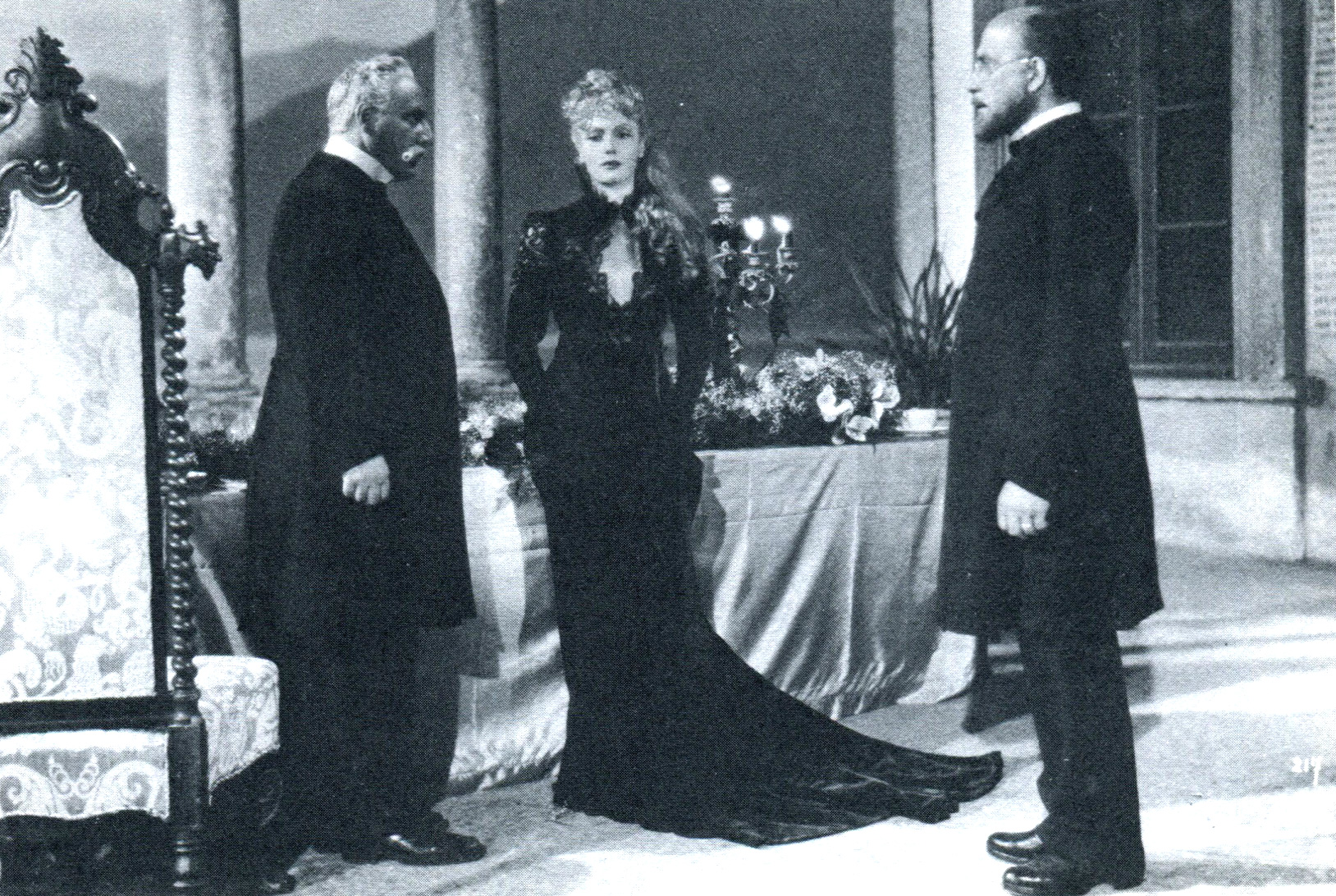 Scena del finale di Malombra (Soldati, 1942) con Filippo Scelzo, Isa Miranda e Luigi Pavese.